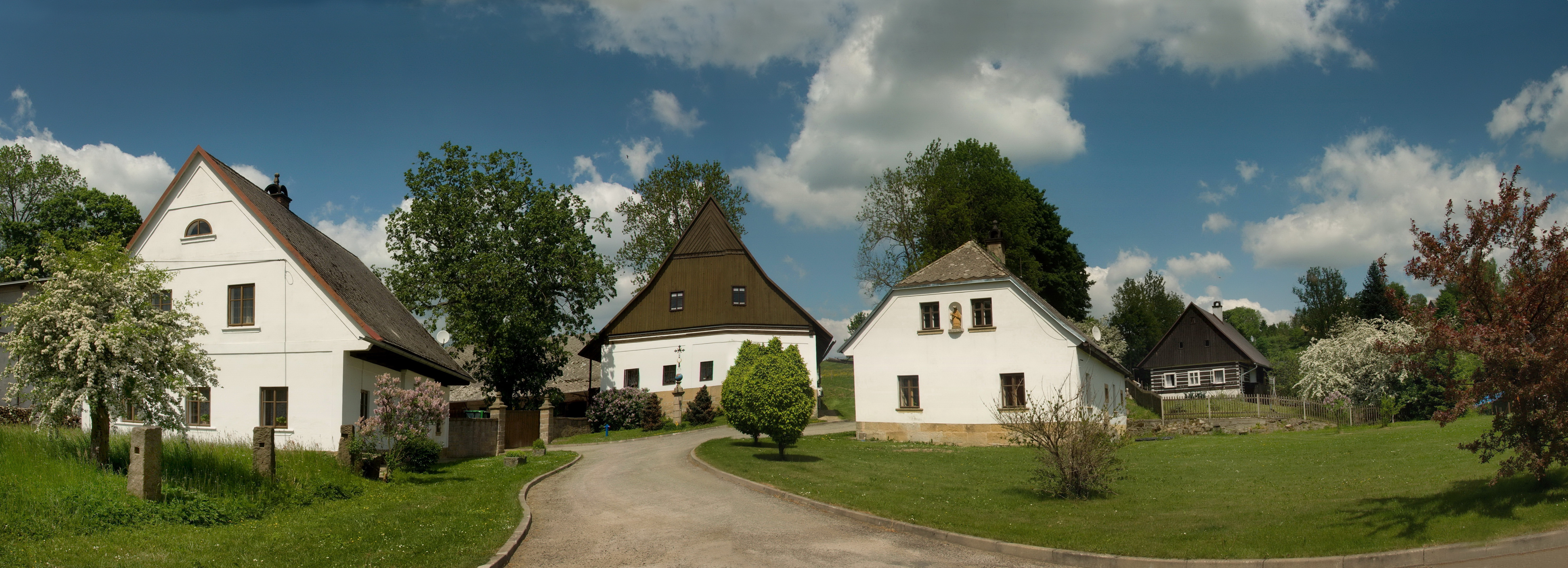 Krucifix (Suchý Důl), náves, Suchý Důl